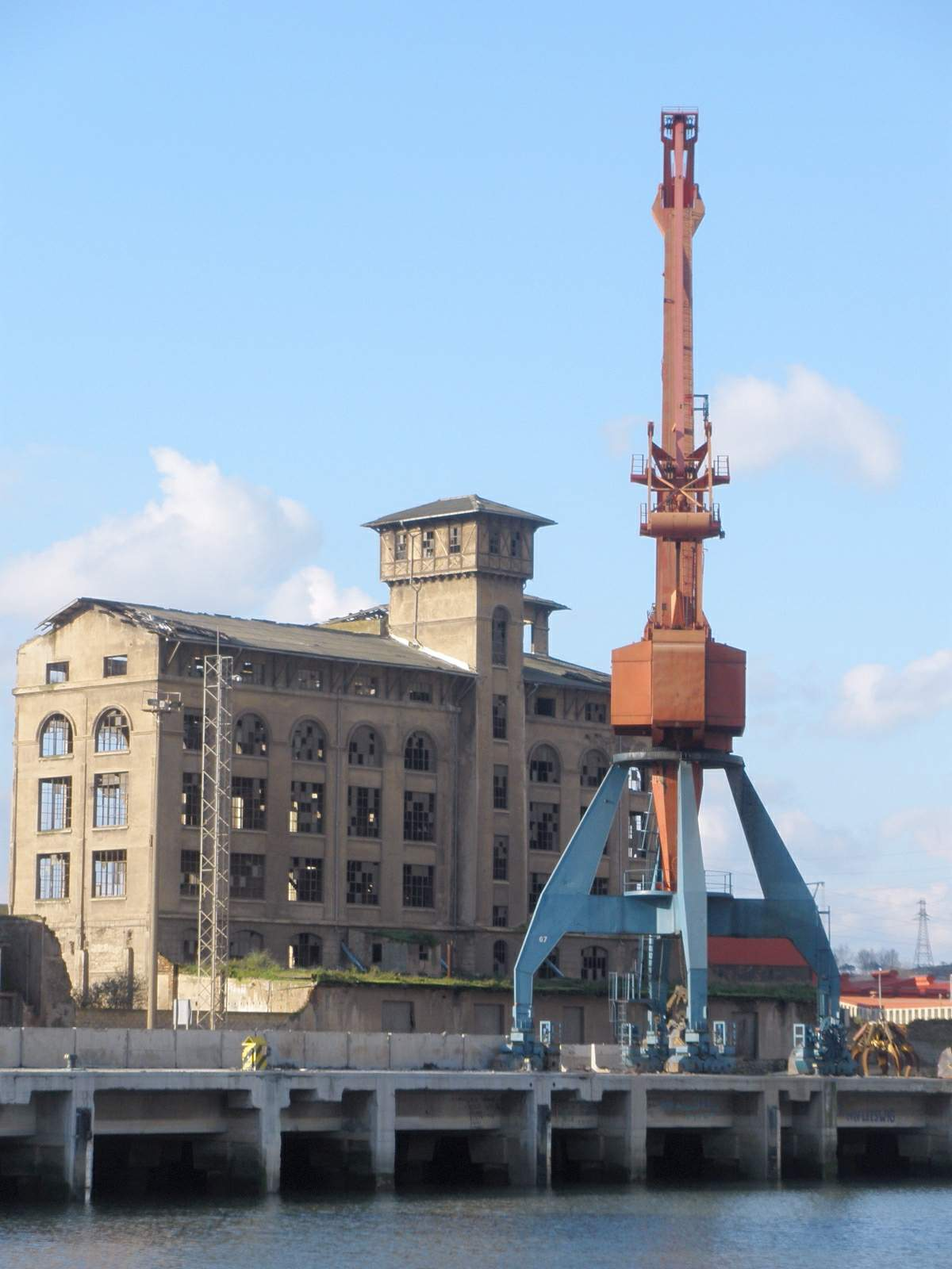 Muelle de Zorrotza y edificio de Molinos Vascos (Bilbao)